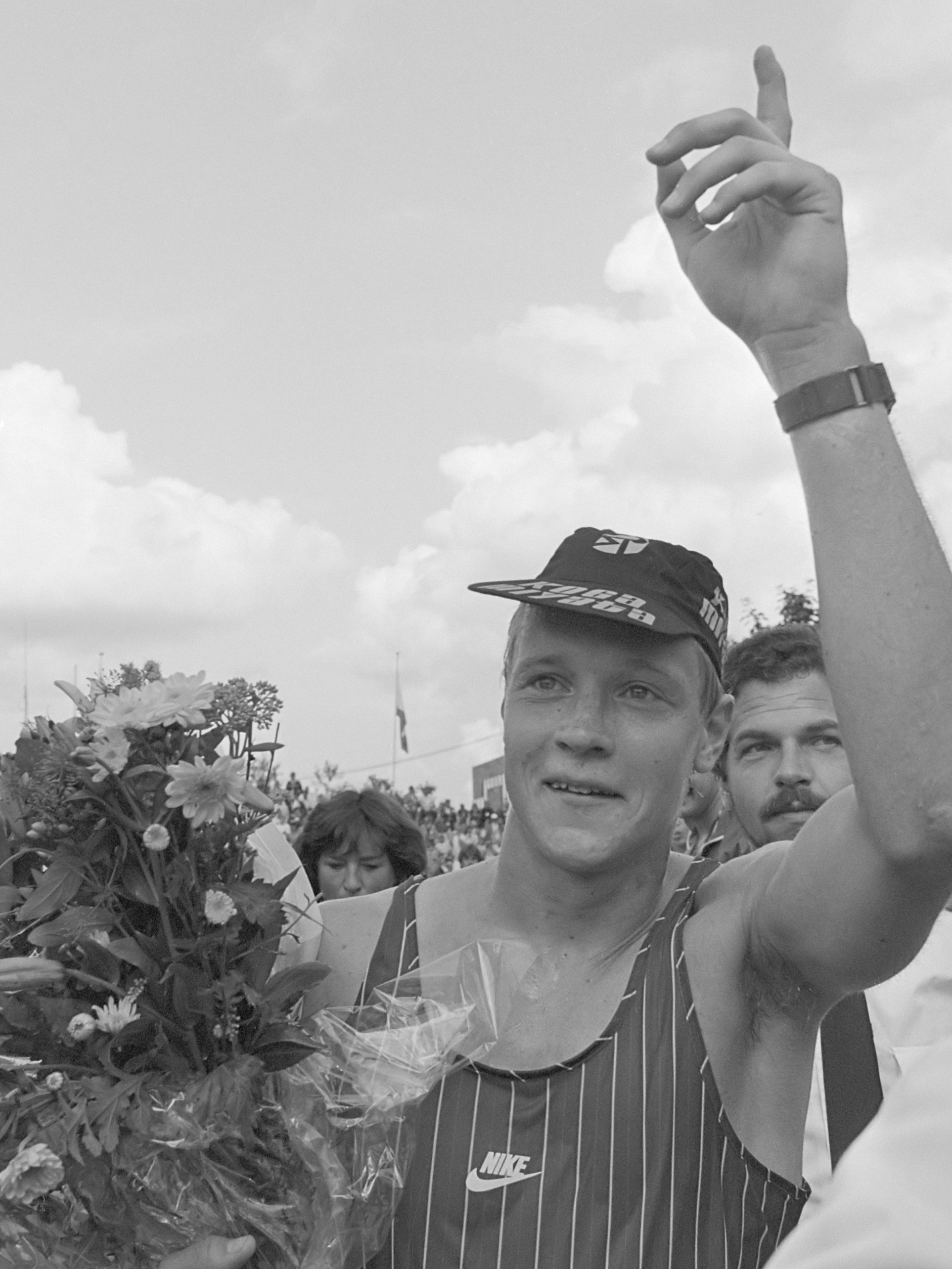 EK triathlon in Almere; Rob Barel na finish (2e) 17 augustus 1985